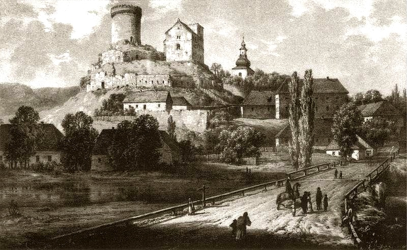 Zamek w Będzinie - Zamek na litografii Napoleona Ordy, 'Album Widoków', Seria 7, 1881